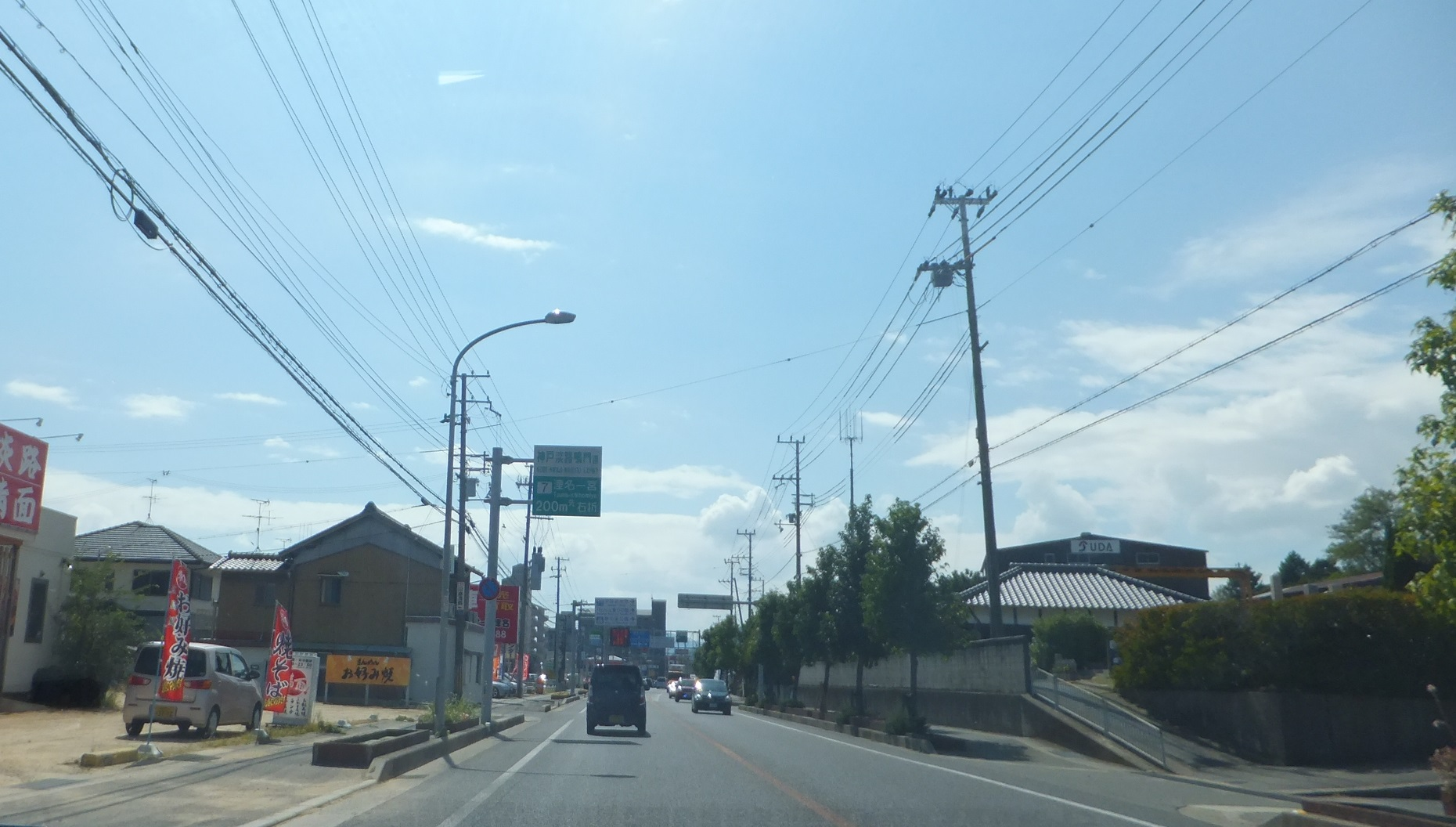 兵庫県淡路市志筑 国道28号